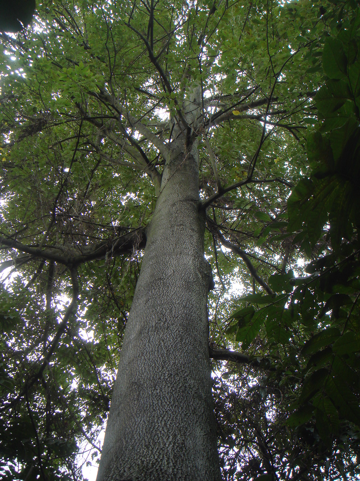 Arapan (Fraxinus chinensis) Jardín Botánico de Bogotá, Colombia